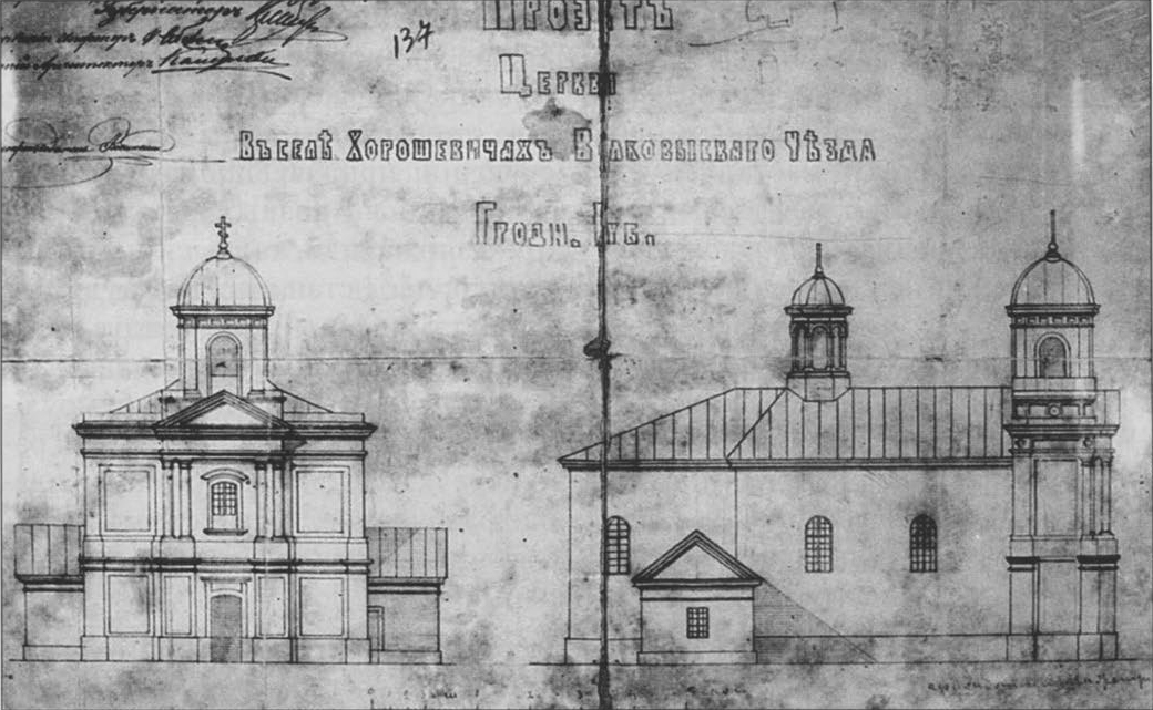 Беларуская (тарашкевіца): Харашэвічы (Charaševičy). Царква, праект перабудовы (?)